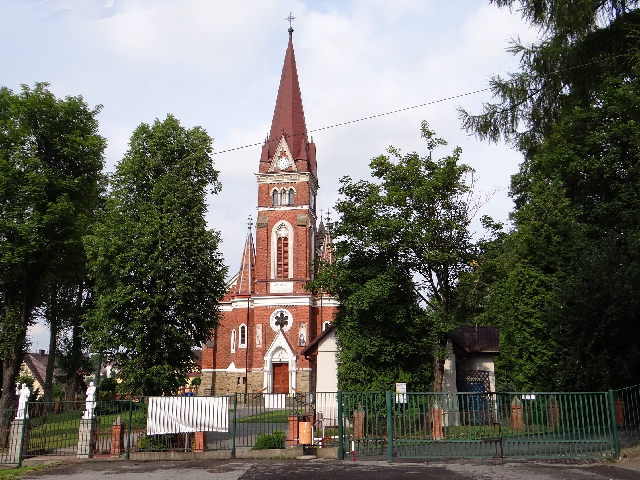 Kościół w Krzeszowie